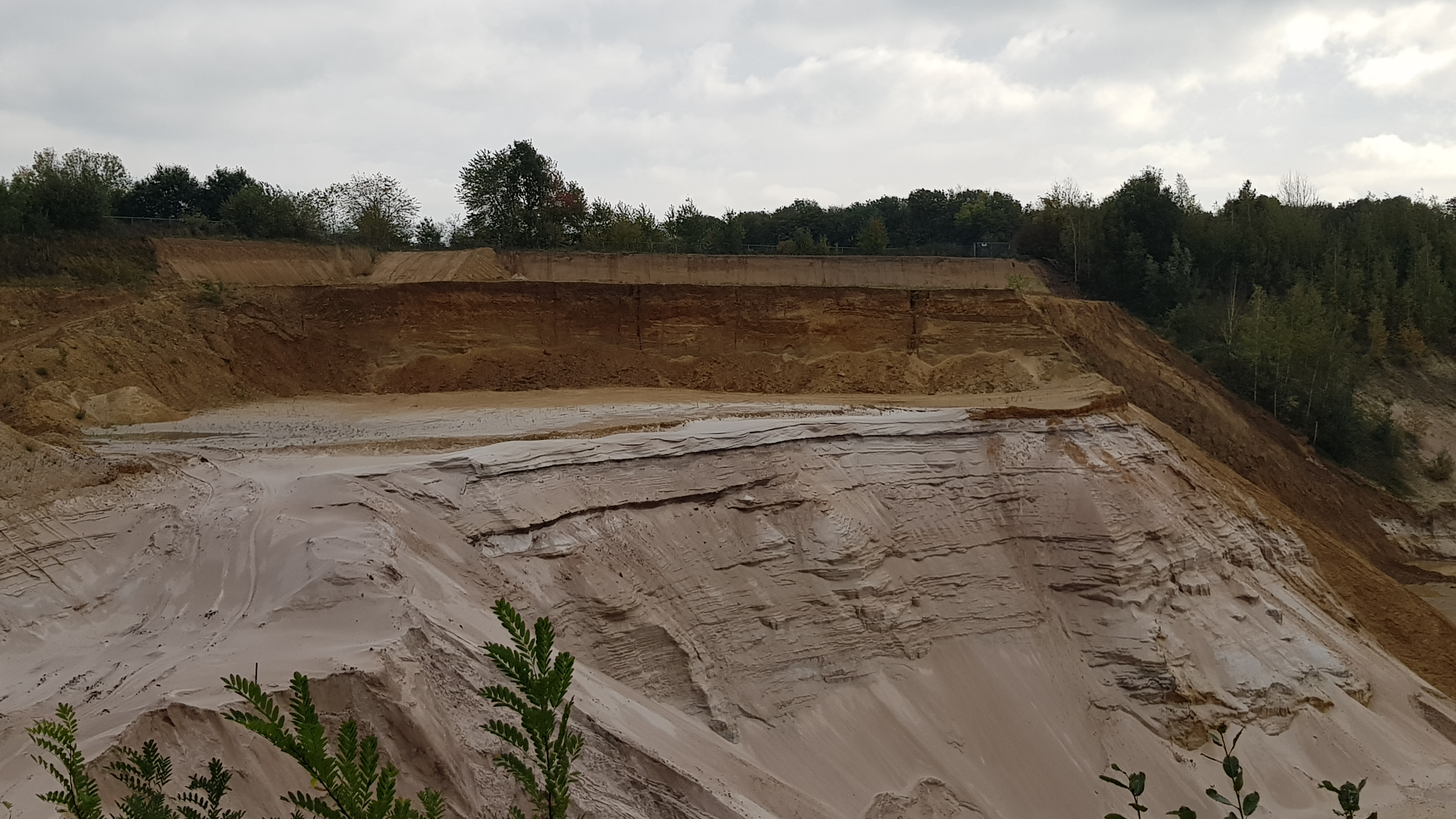 Groeve Spaubeek, Spaubeek, Nederland